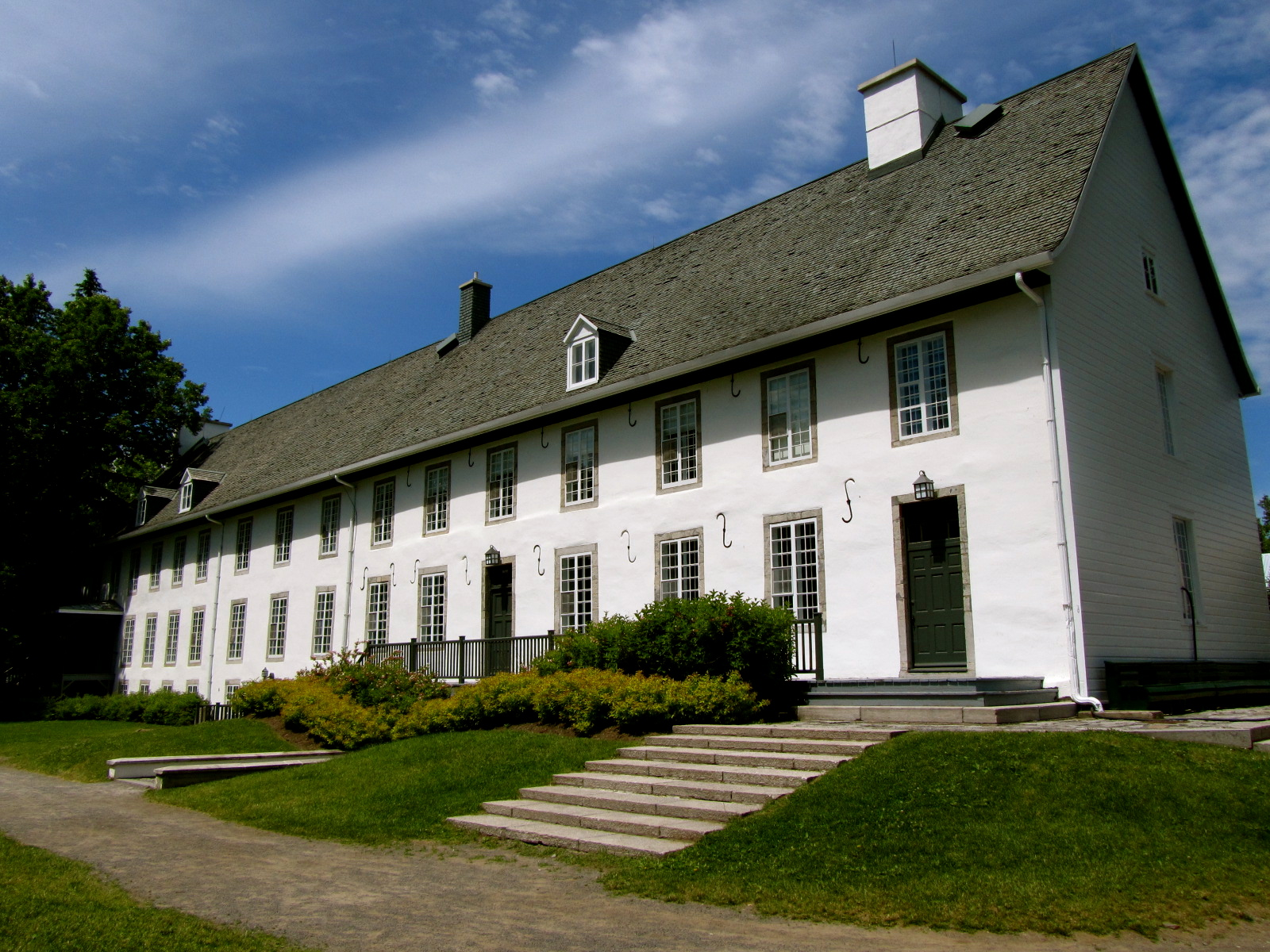 Face nord du Château Angos-des-Maizerets, Domaine de Maizerets